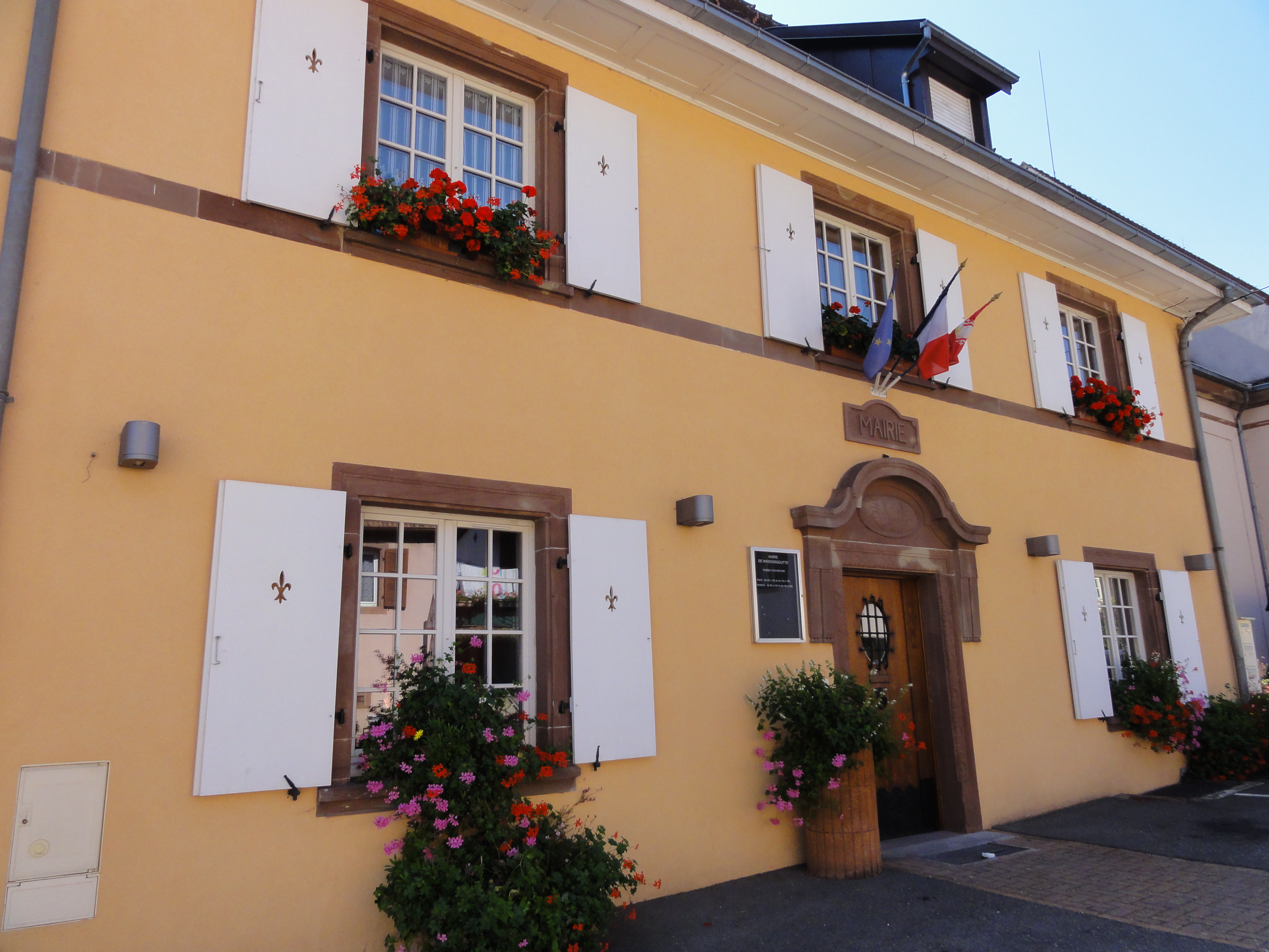 Alsace, Bas-Rhin, Maisonsgoutte, Ancien presbytère (XXe), actuellement mairie, 47 Grand'Rue. .